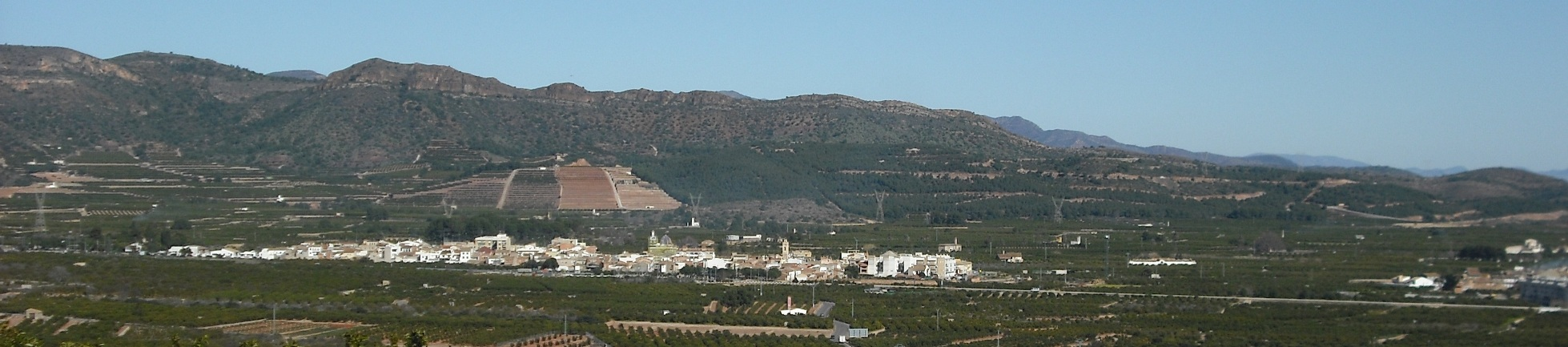 Vista de Quart de les Valls desde la ermita del Bon Succés de Benifairó de les Valls.